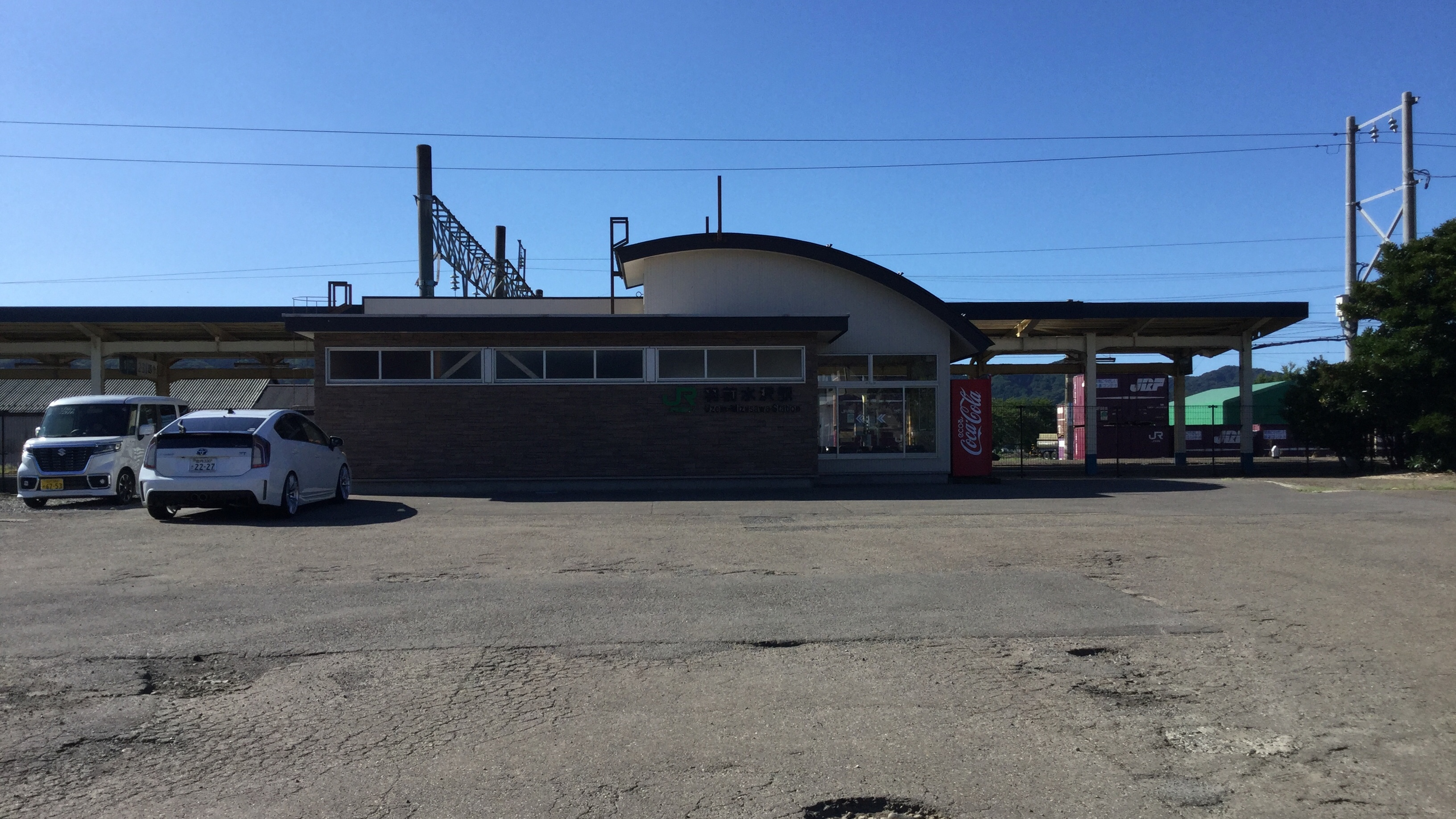 羽前水沢駅新駅舎